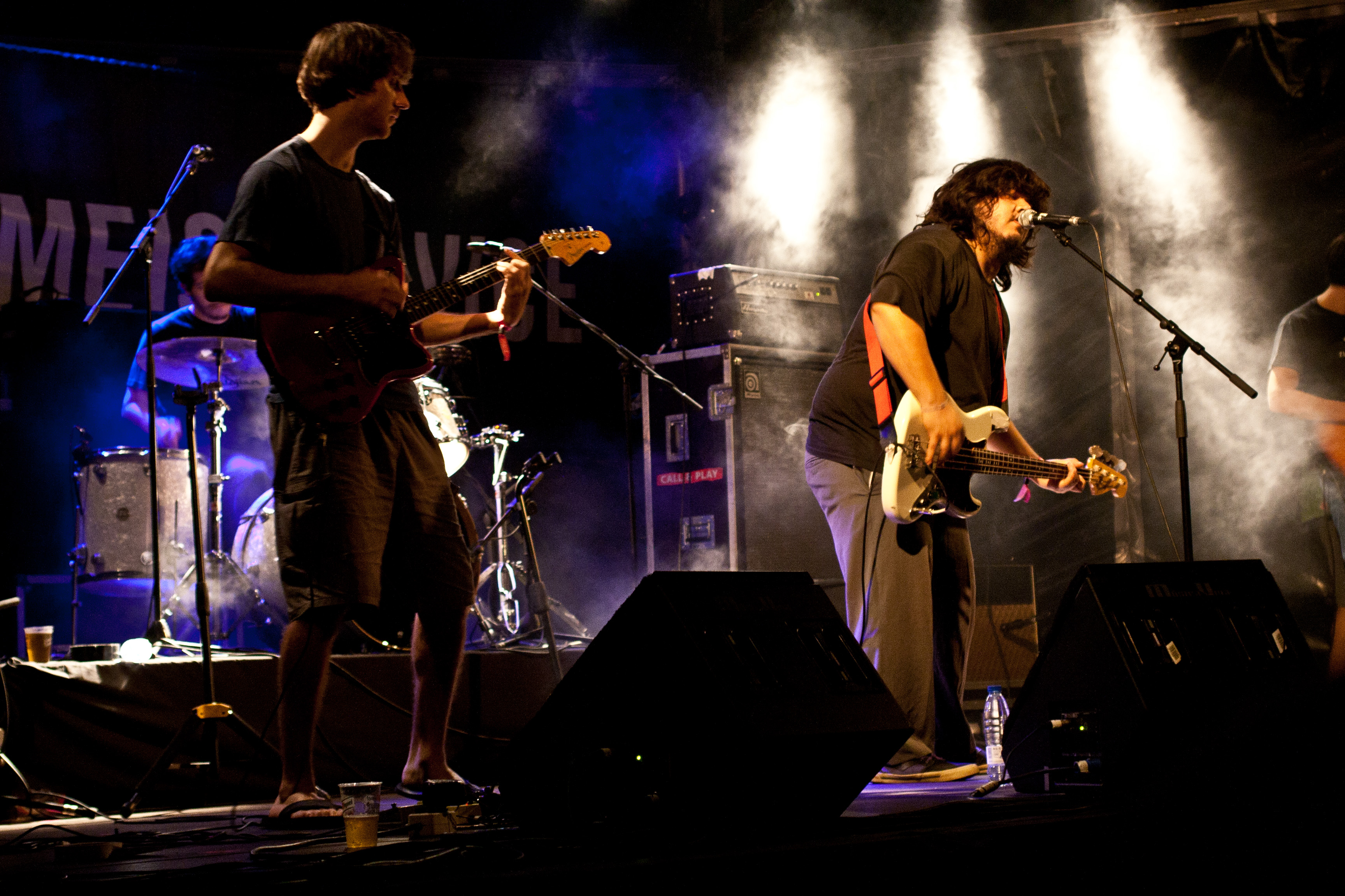 El Mató a un Policia Motorizado